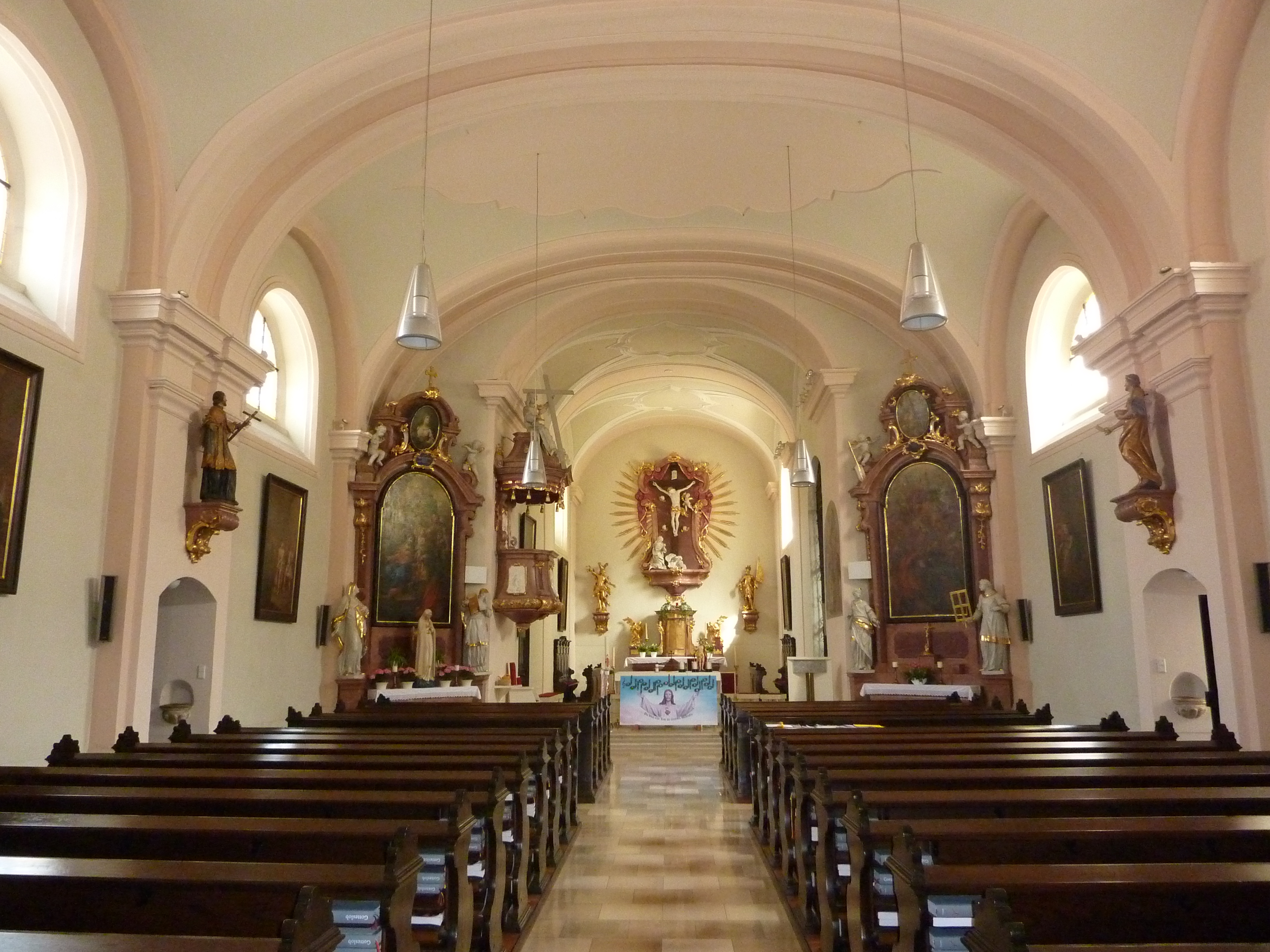 Pfarrkirche hll. Peter und Paul, Landsknechtplatz, Hadersdorf, Hadersdorf-Kammern, Niederösterreich